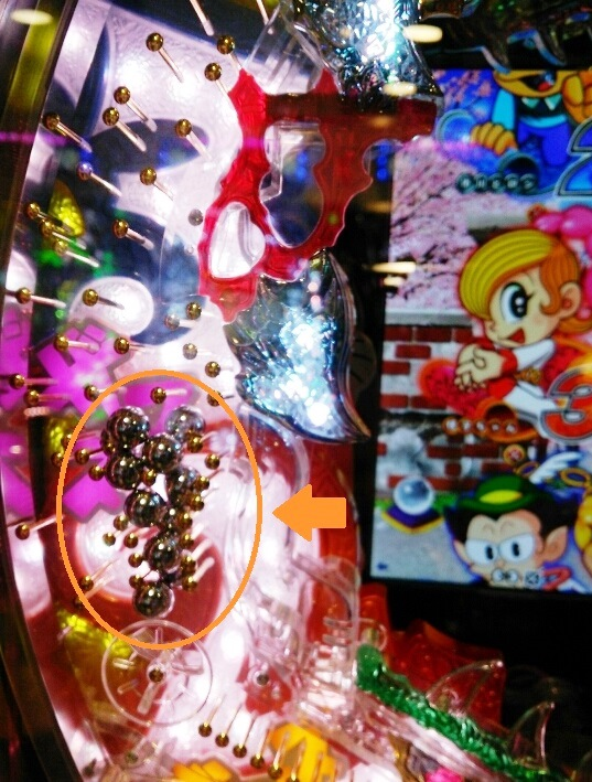 パチンコ台において、玉が釘と釘の間に詰まってひと塊になる現象を葡萄に例えて「ブドウ」と呼ぶ（画像では円で囲った箇所がそれに該当）。